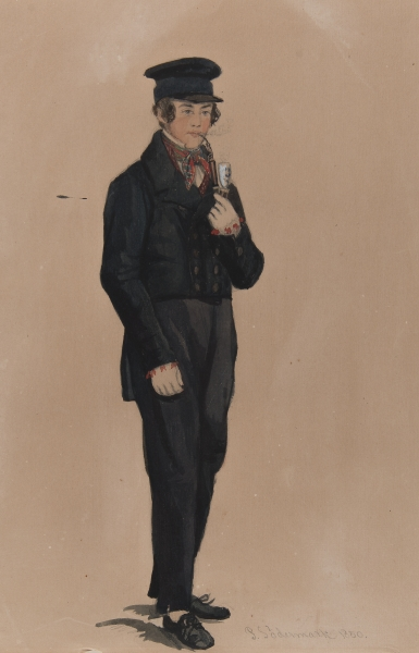 Man i dräkt. Akvarell av P Södermark 1850. Depicted place: Lima socken (Q10561942)